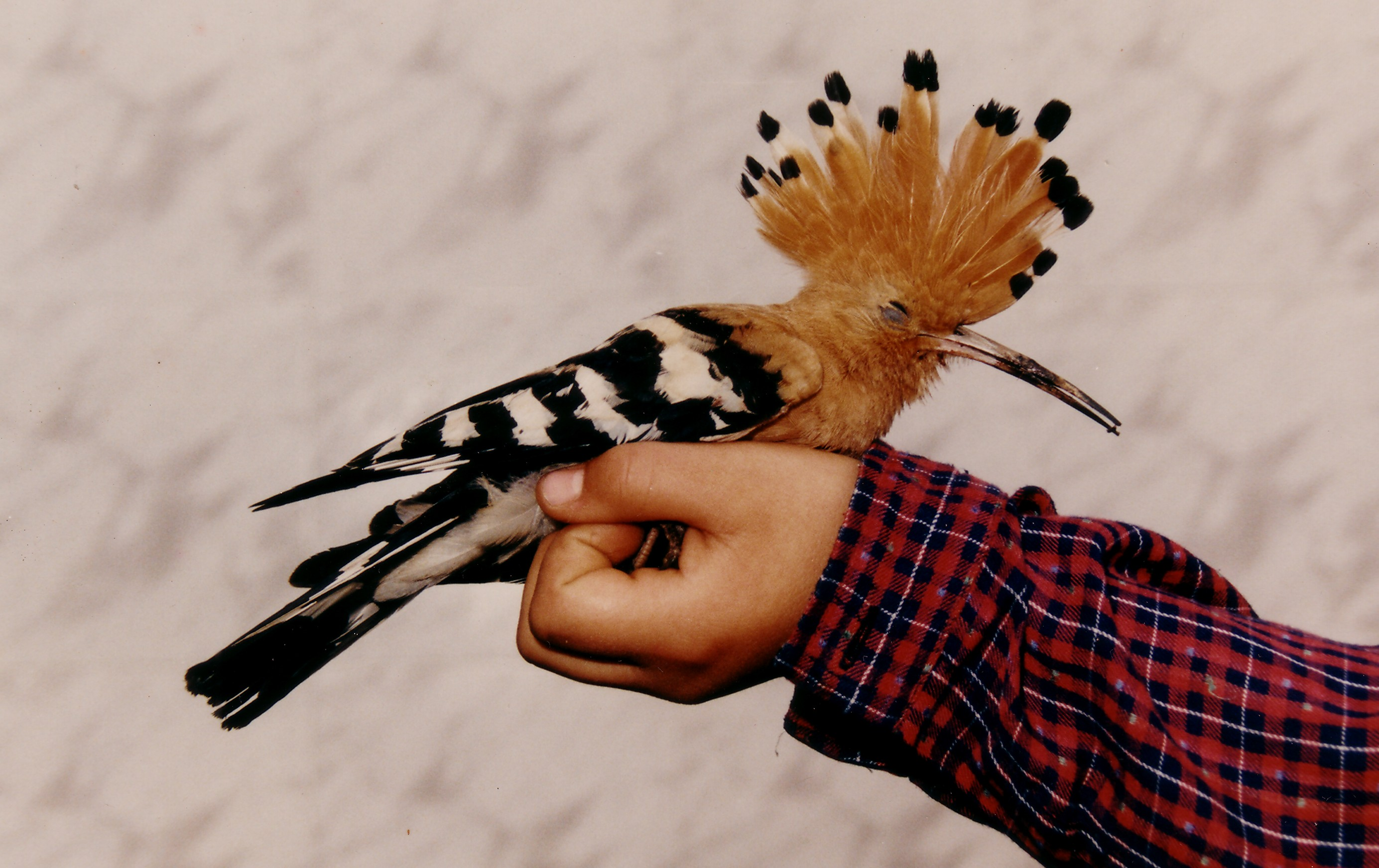 Bubela (Upupa epops) (Noalla, Sanxenxo, 1994).